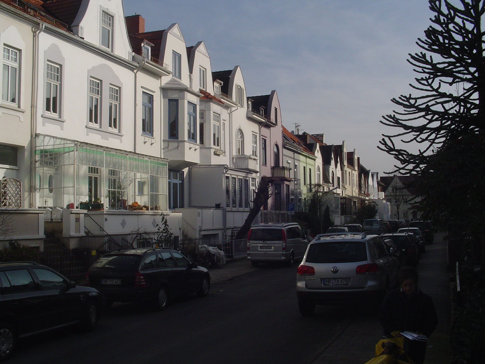 Bremer Häuser in der Prager Straße in Bremen-Schwachhausen